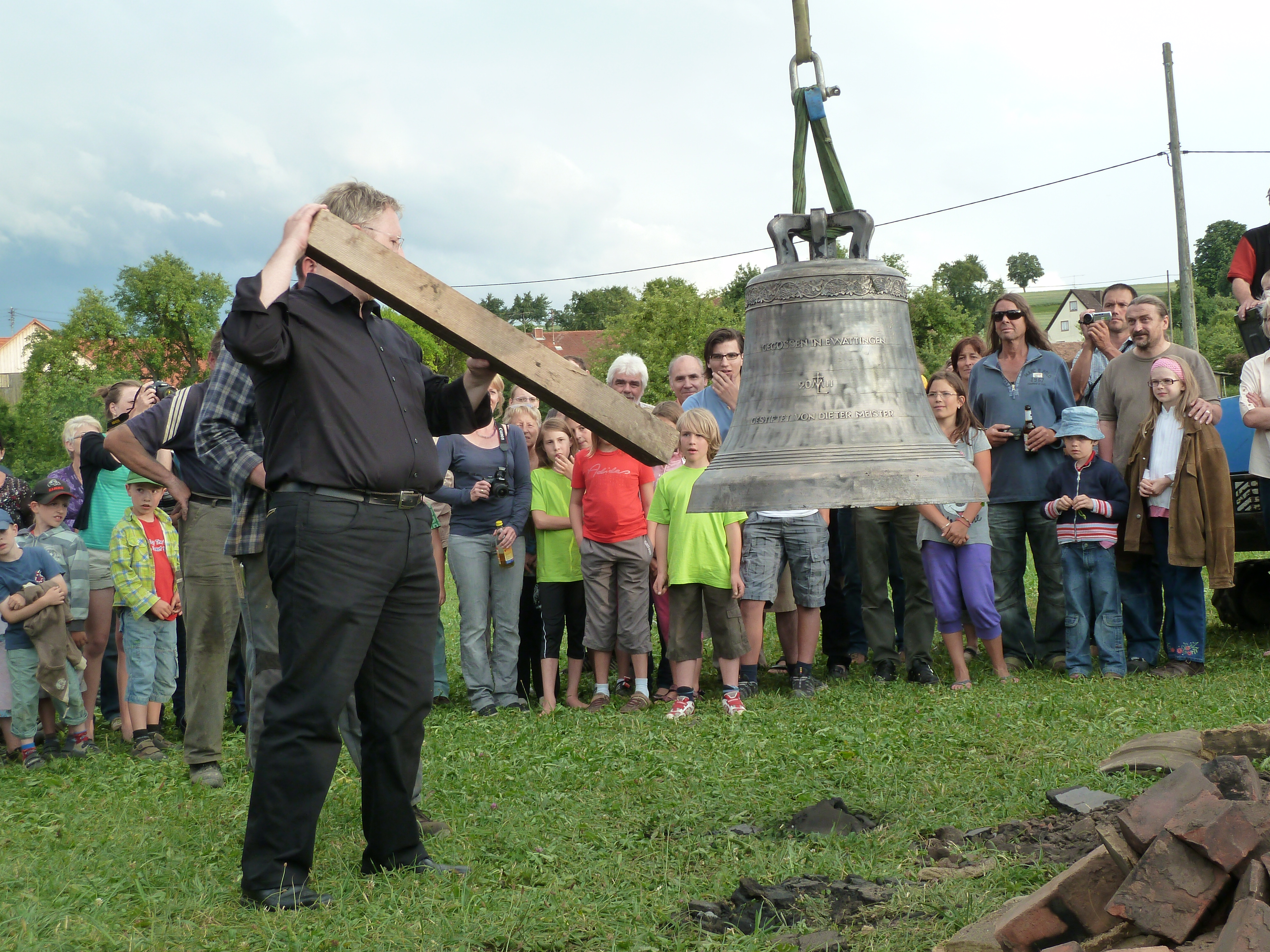 Glockenguss in Ewattingen mit Bruder Michael Reuter von der Abtei Maria Laach